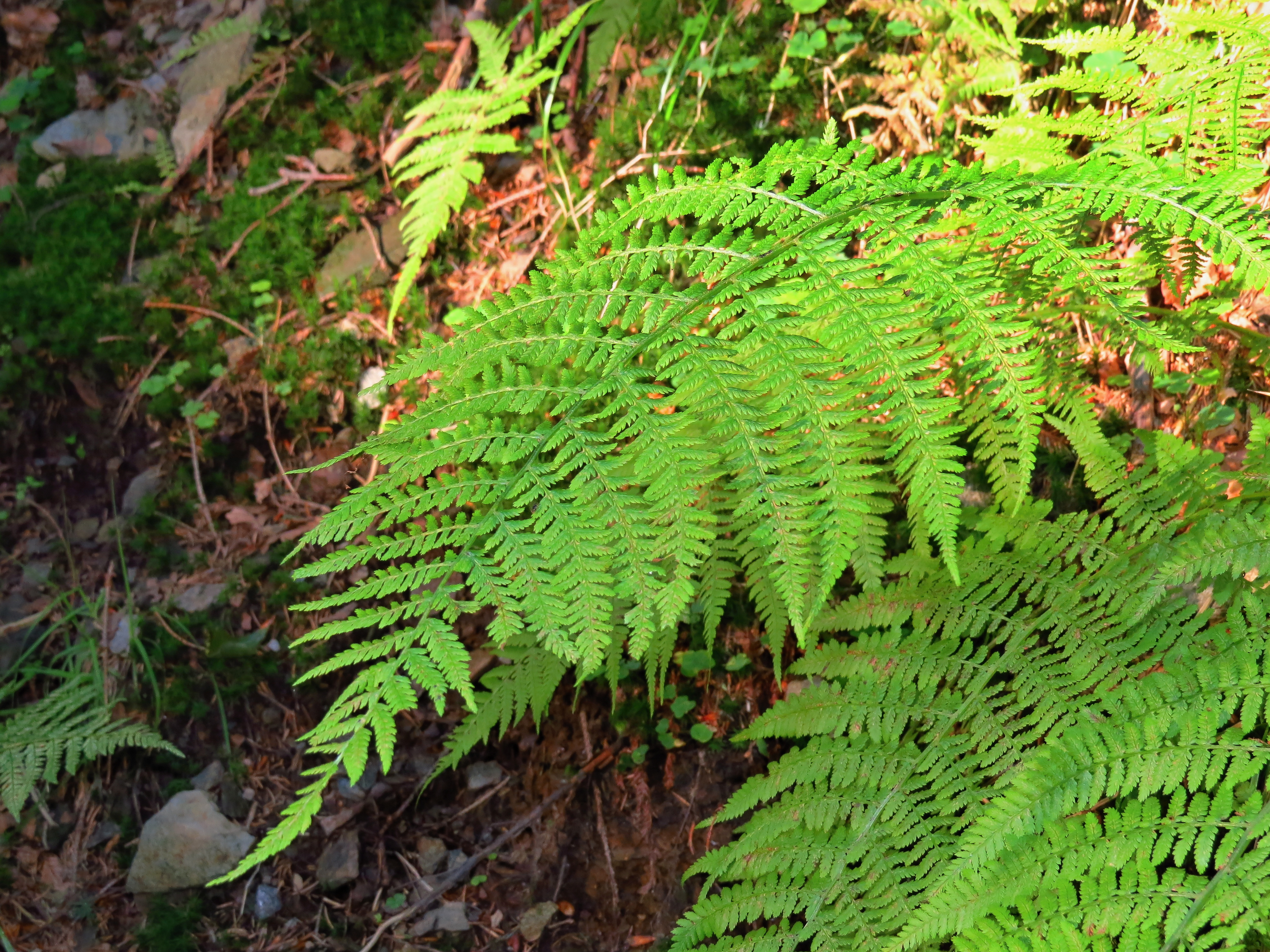 Kapradiny (Polypodiophyta) Project: Chráněná území.